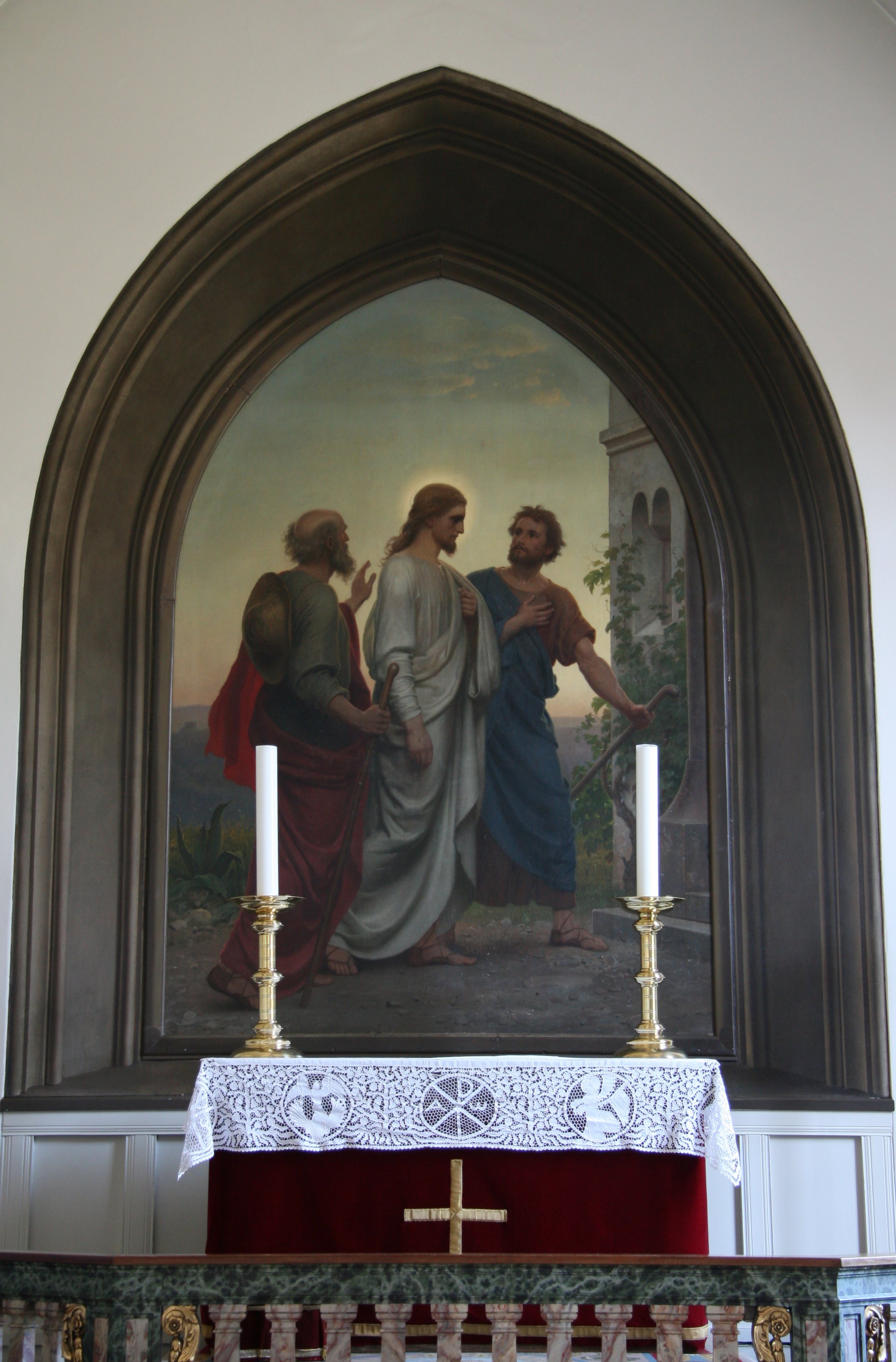 Emmauskirken, Frederiksberg, Denmark. Private church belonging to Diakonissestiftelsen (Danish Deaconess Community), Altar